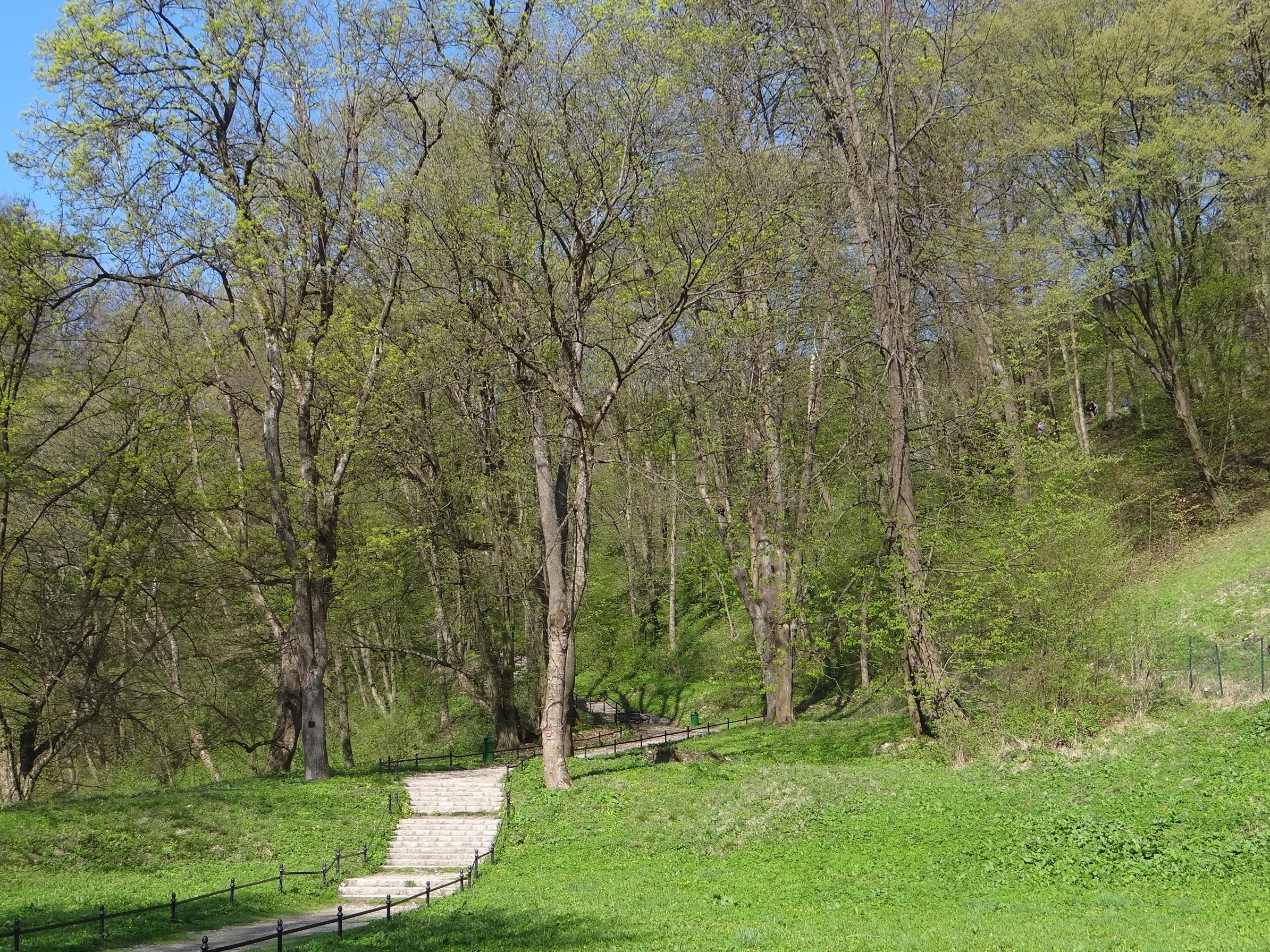 Park Zamkowy w Ojcowie